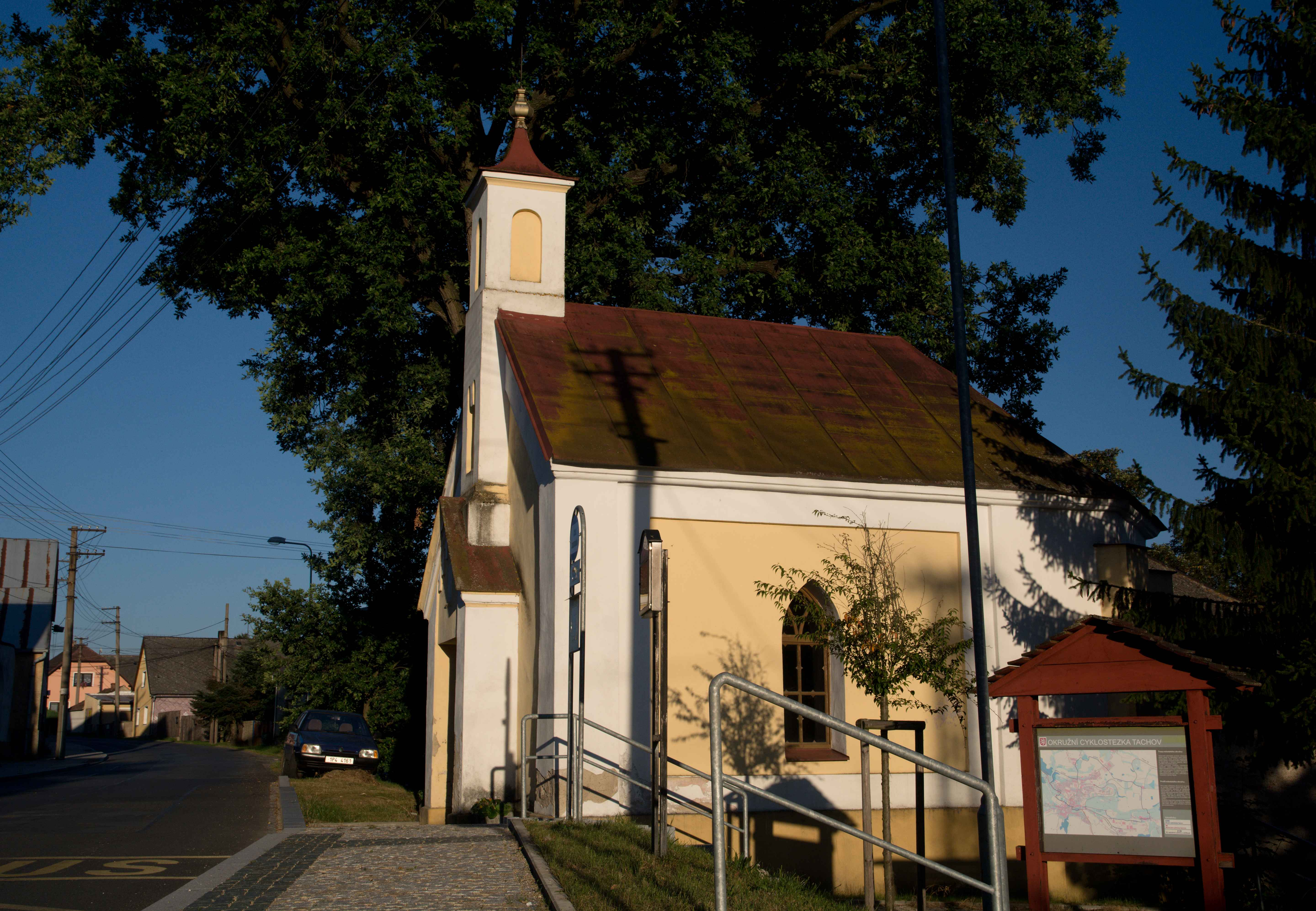 Oldřichov Kaplička